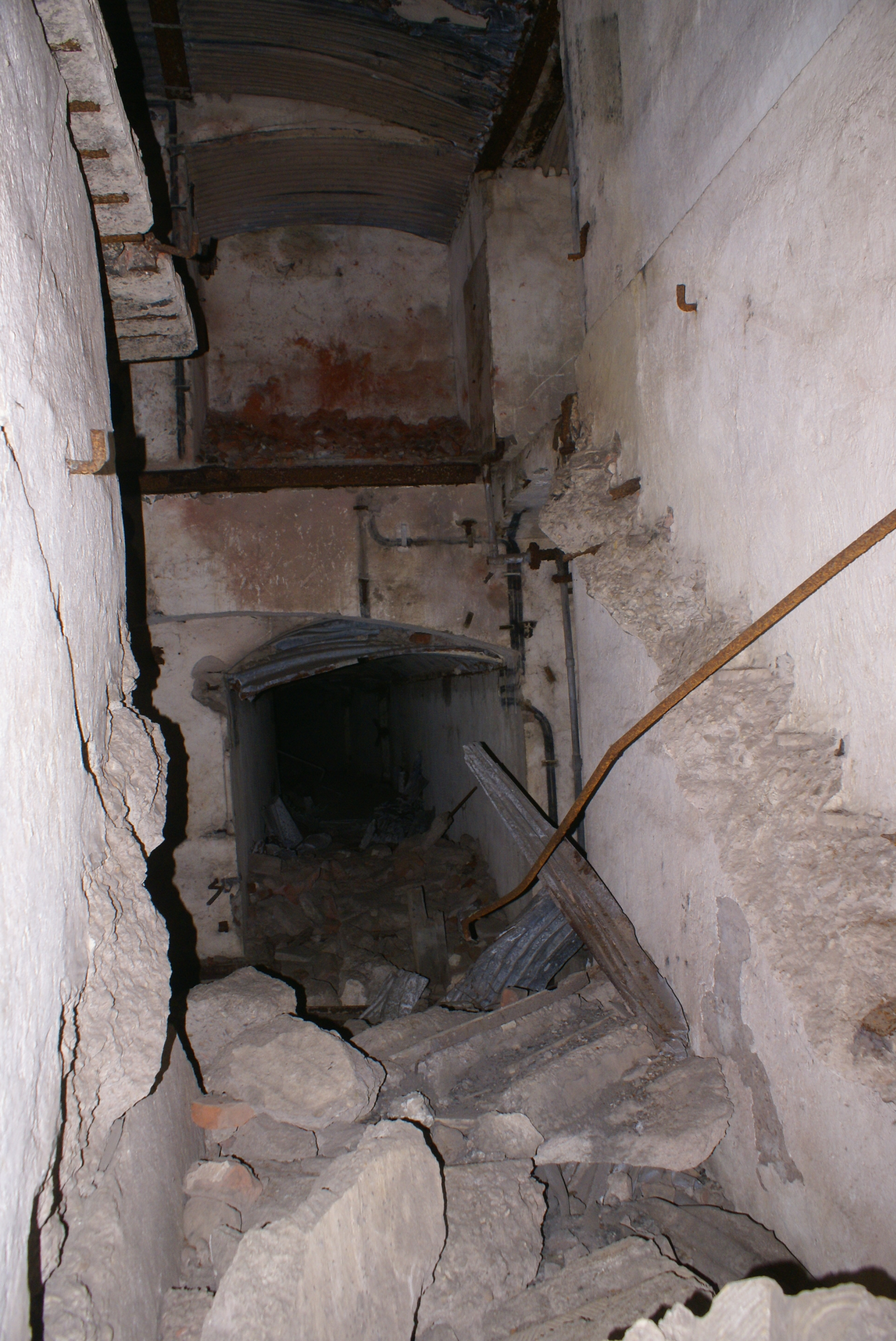 Vue sur l'ampleur des dégâts dans le fort d'Illange